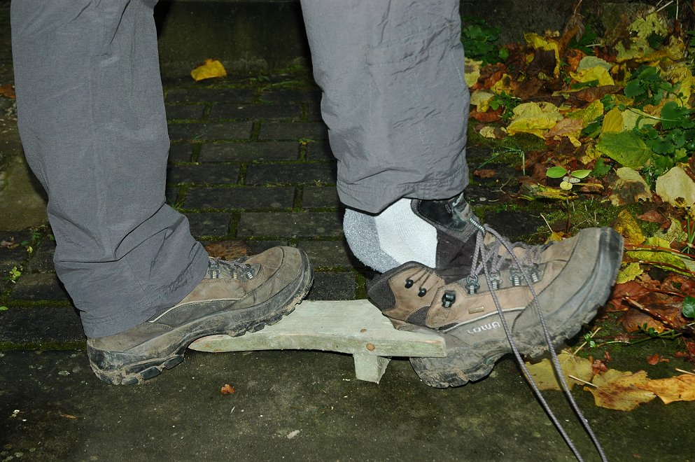 Stiefelknecht (Benutzung)